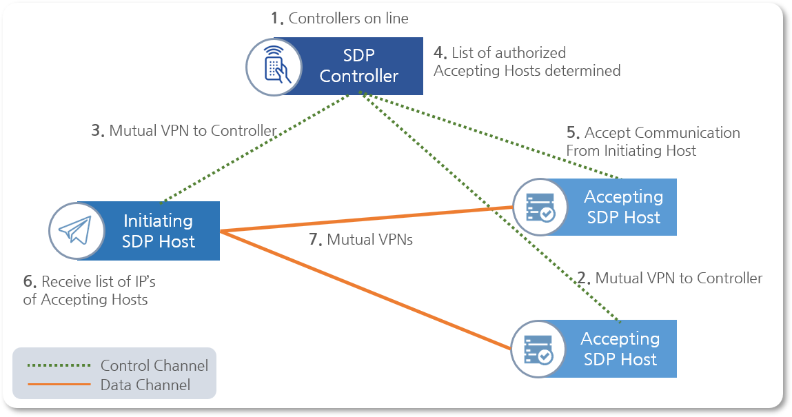 SDP 아키텍처 & 워크 플로우, 출처 : CSA